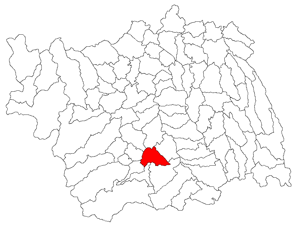 Categorie:Hărţi ale judeţului Bacău